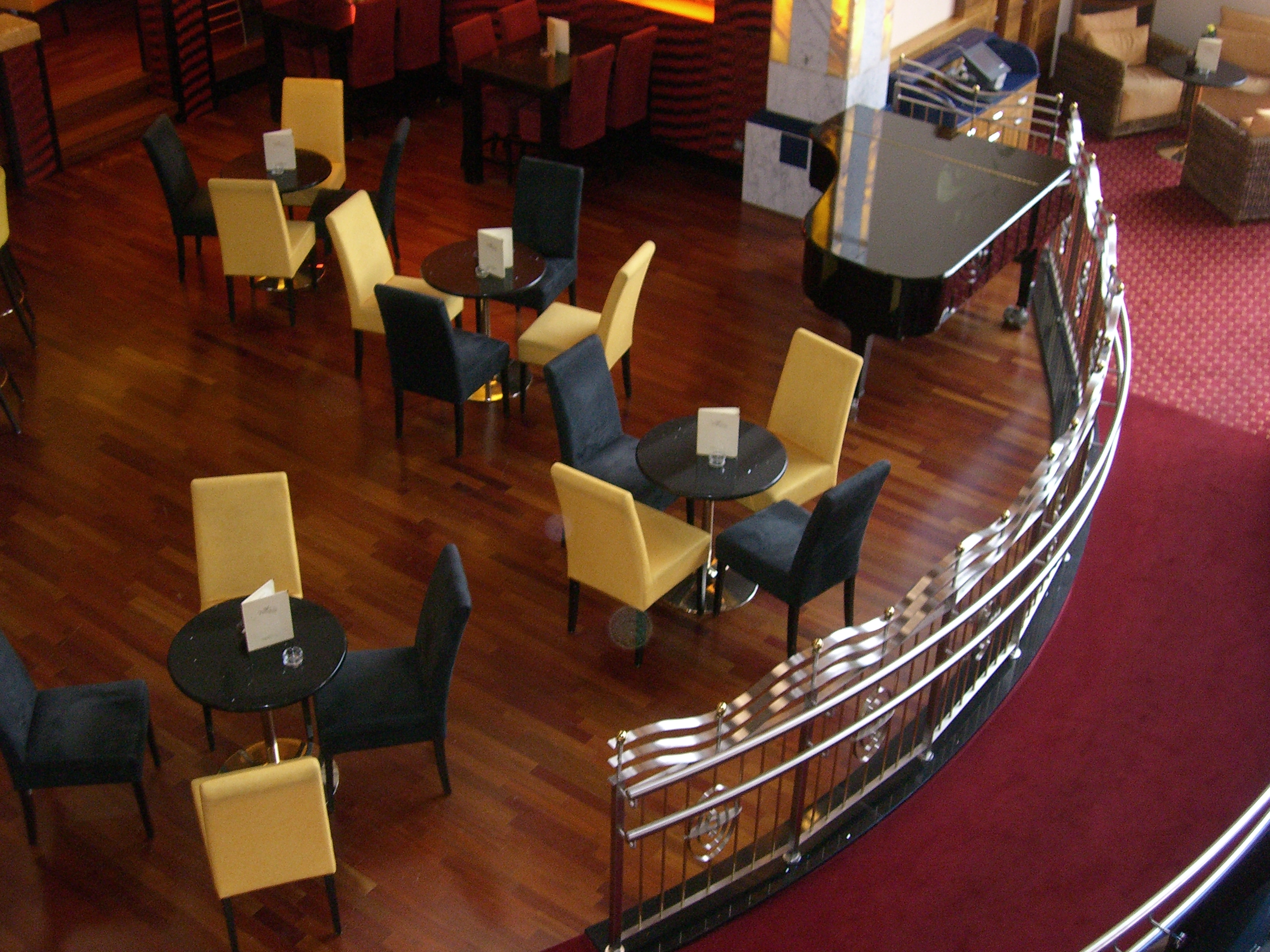 Pianobar in einem Hotel